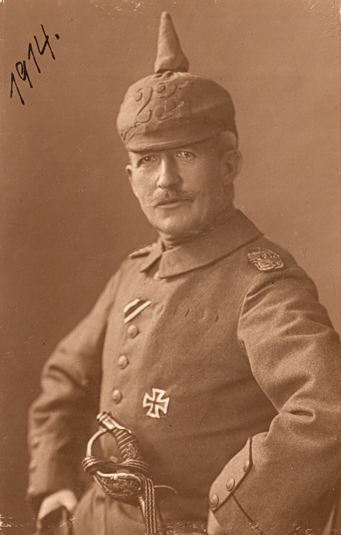 Curt von Kronhelm (1859-1937), prussian generalmajor